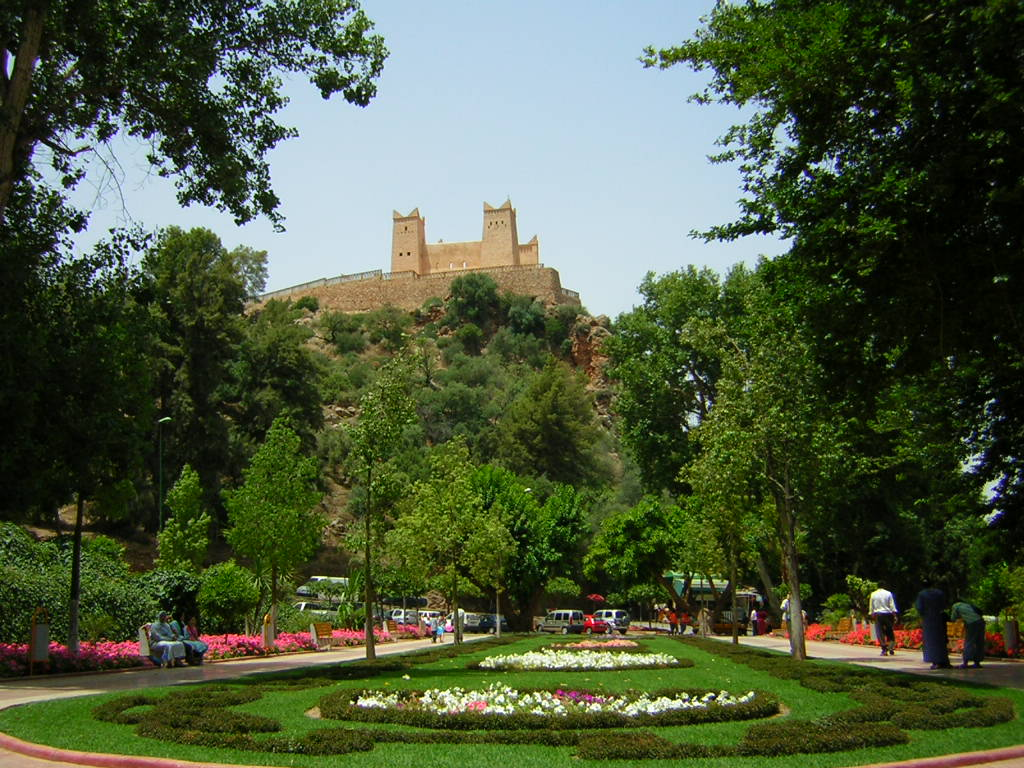 القصر،